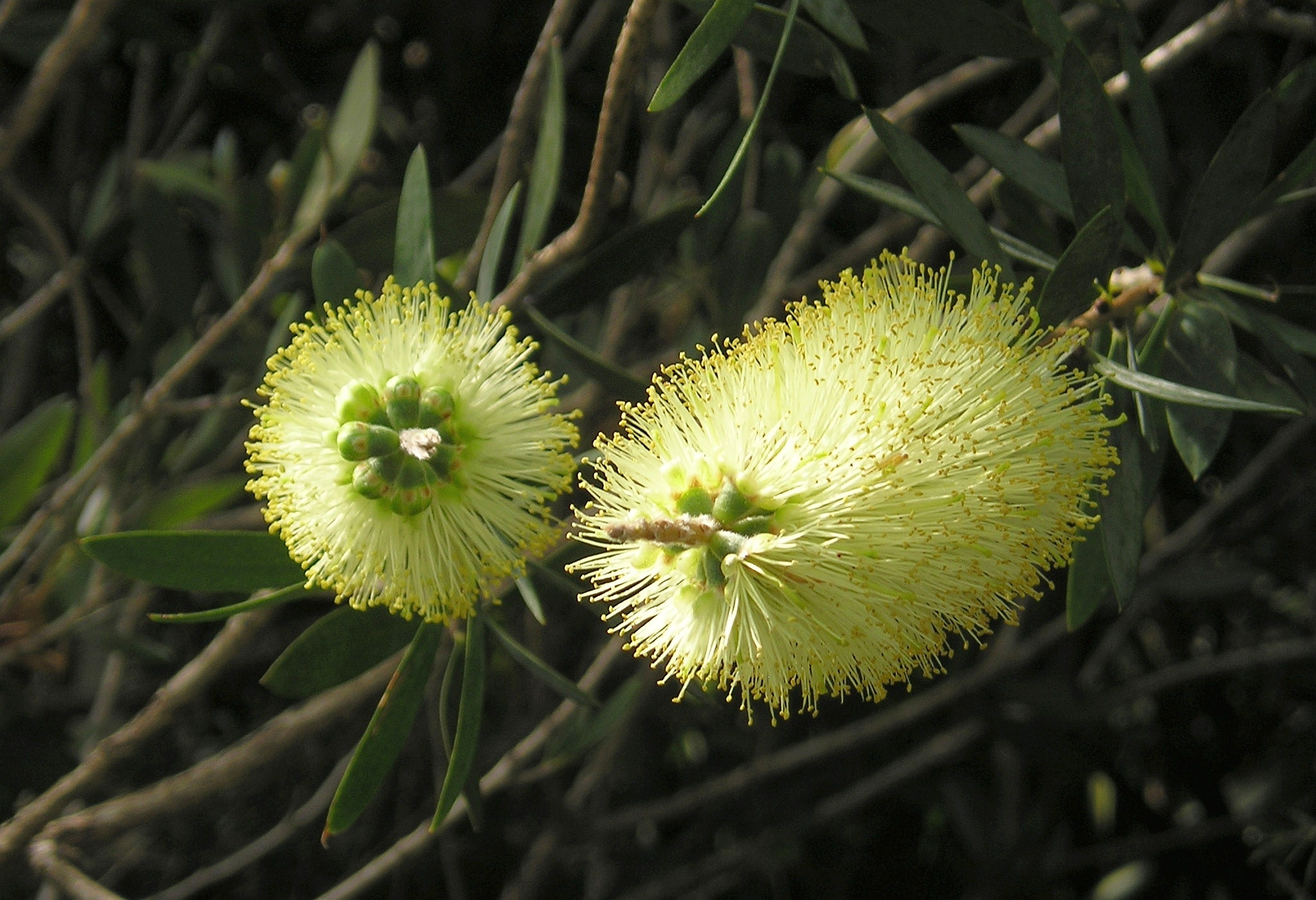 Zitronen-Flaschenbürste (Callistemon pallidus) Botanischer Garten TU Dresden, April 2009 Creative Commons Licence BY 2.0 Quellenangabe / Credit: Photo by Maja Dumat